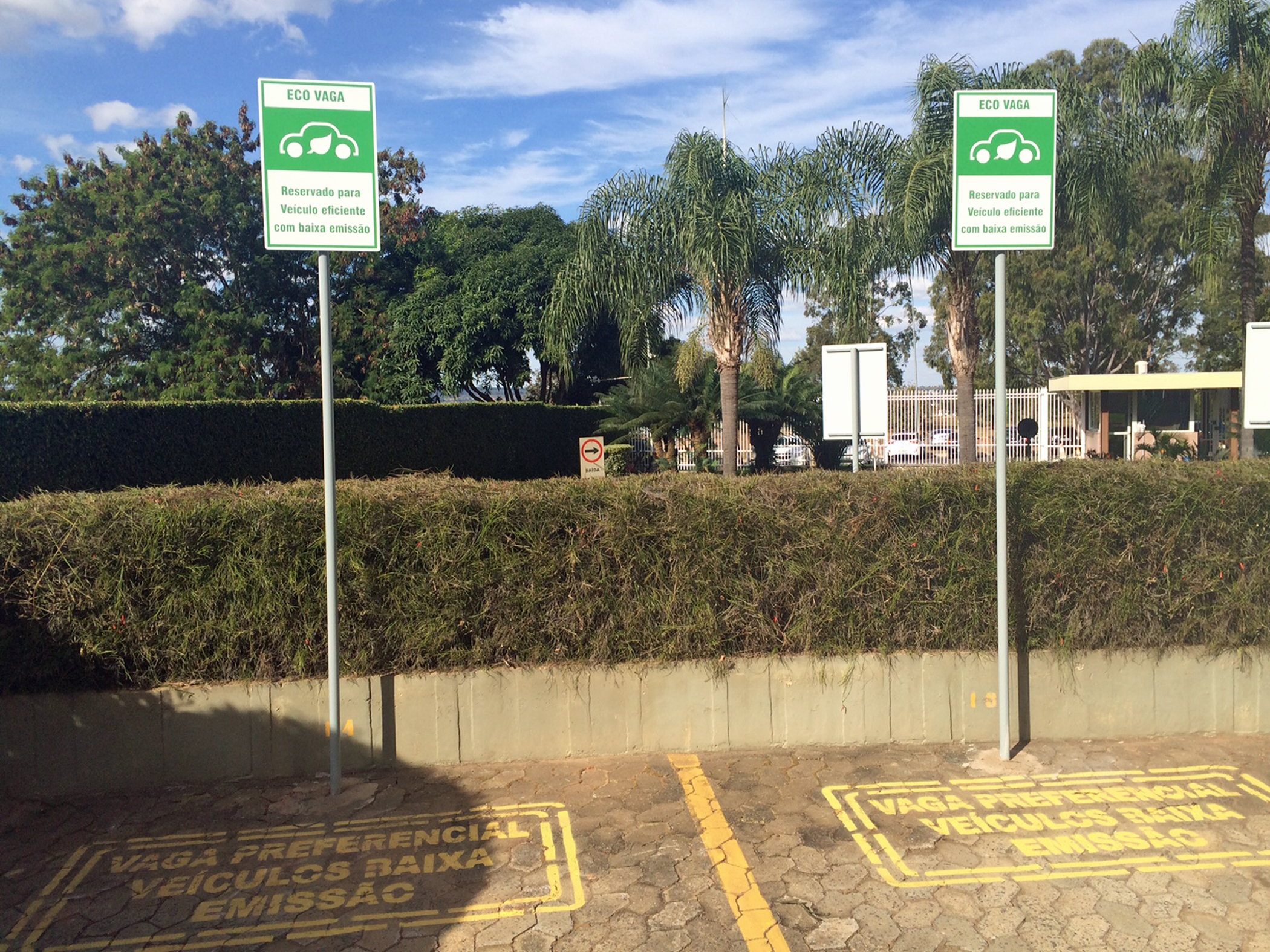 Eco Vaga reservada para veículo com baixa emissão em Brasília